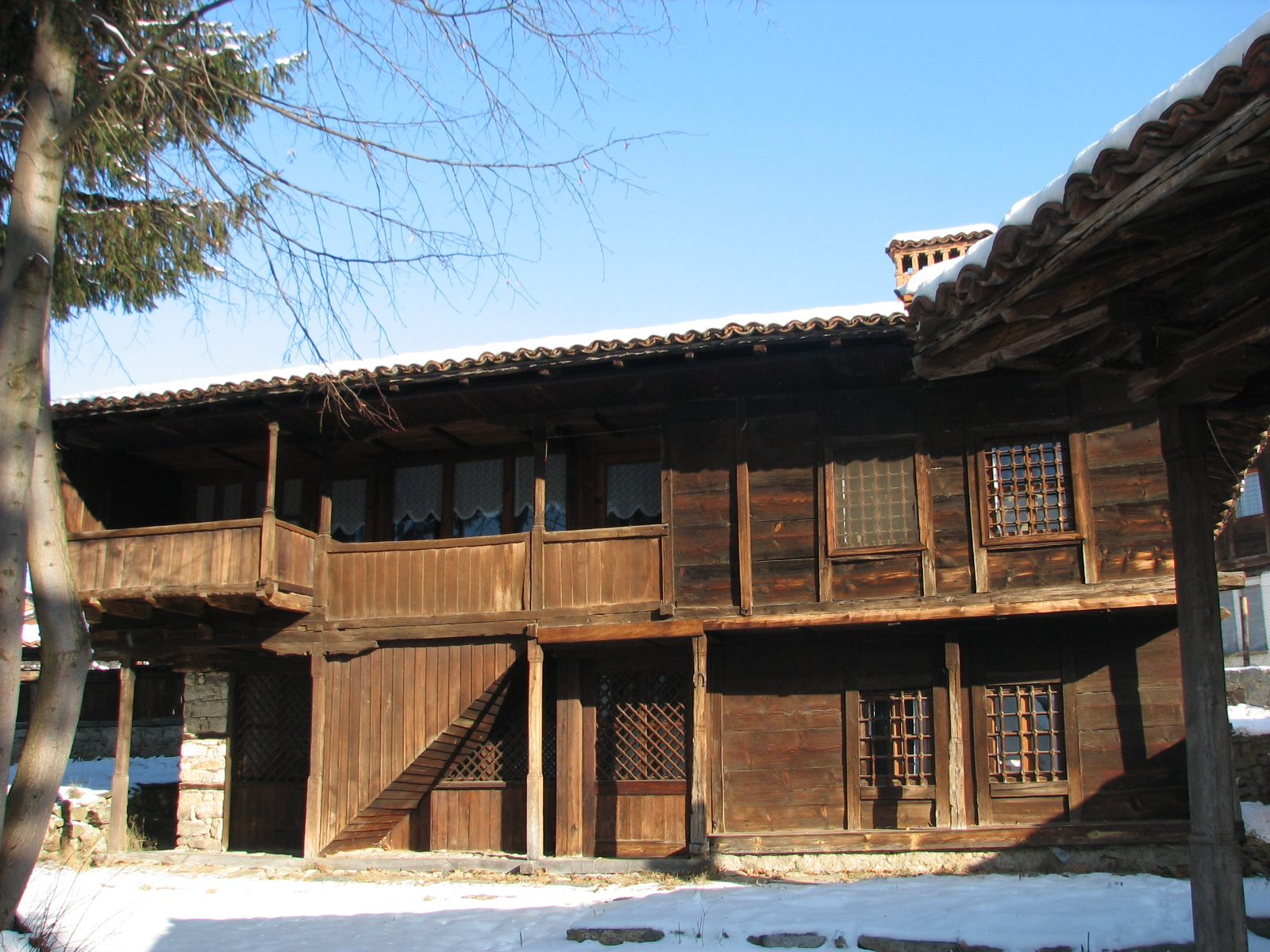 Къщата на дядо Либен